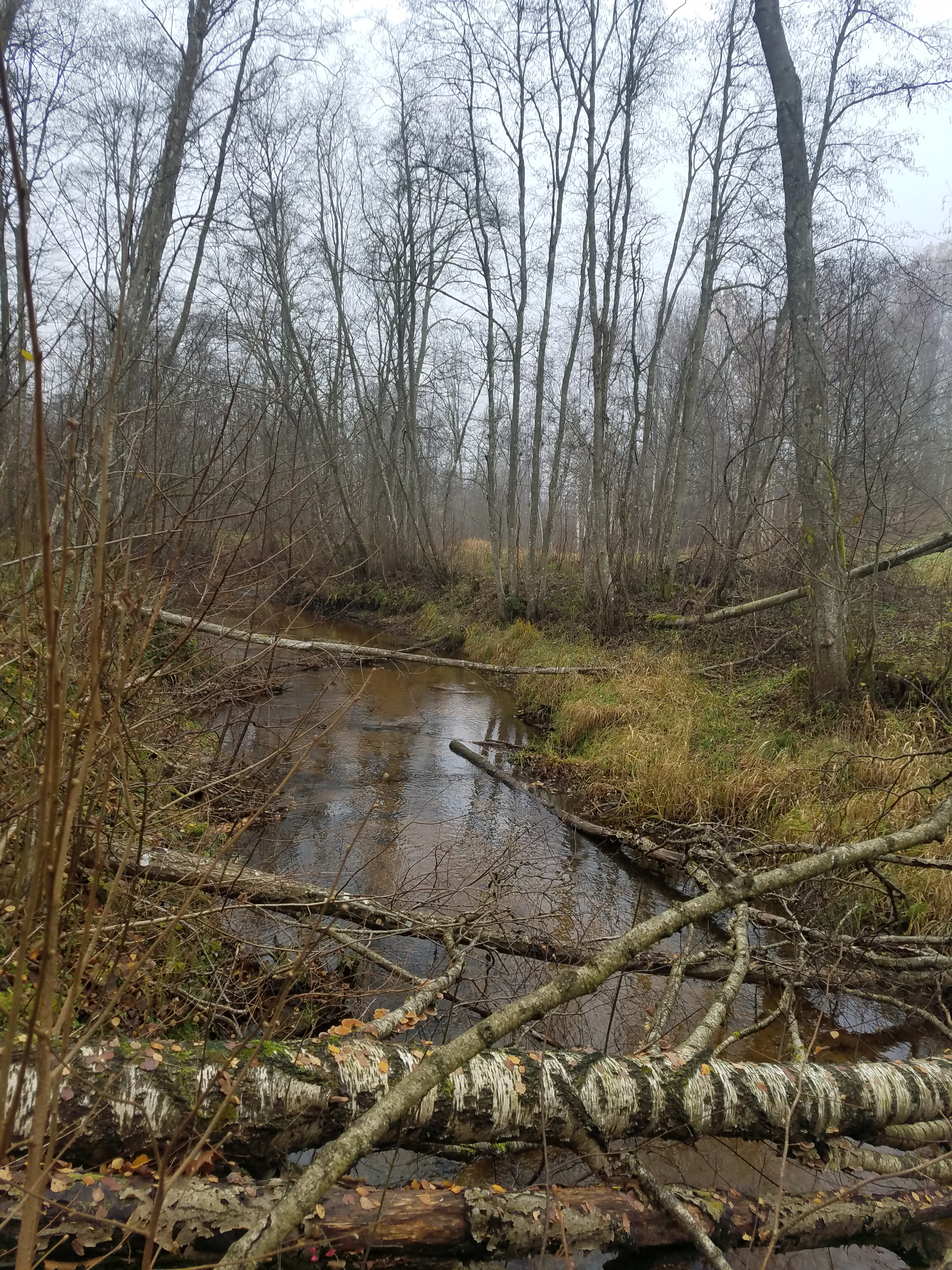 0,1 km nuo santakos su Babrungu